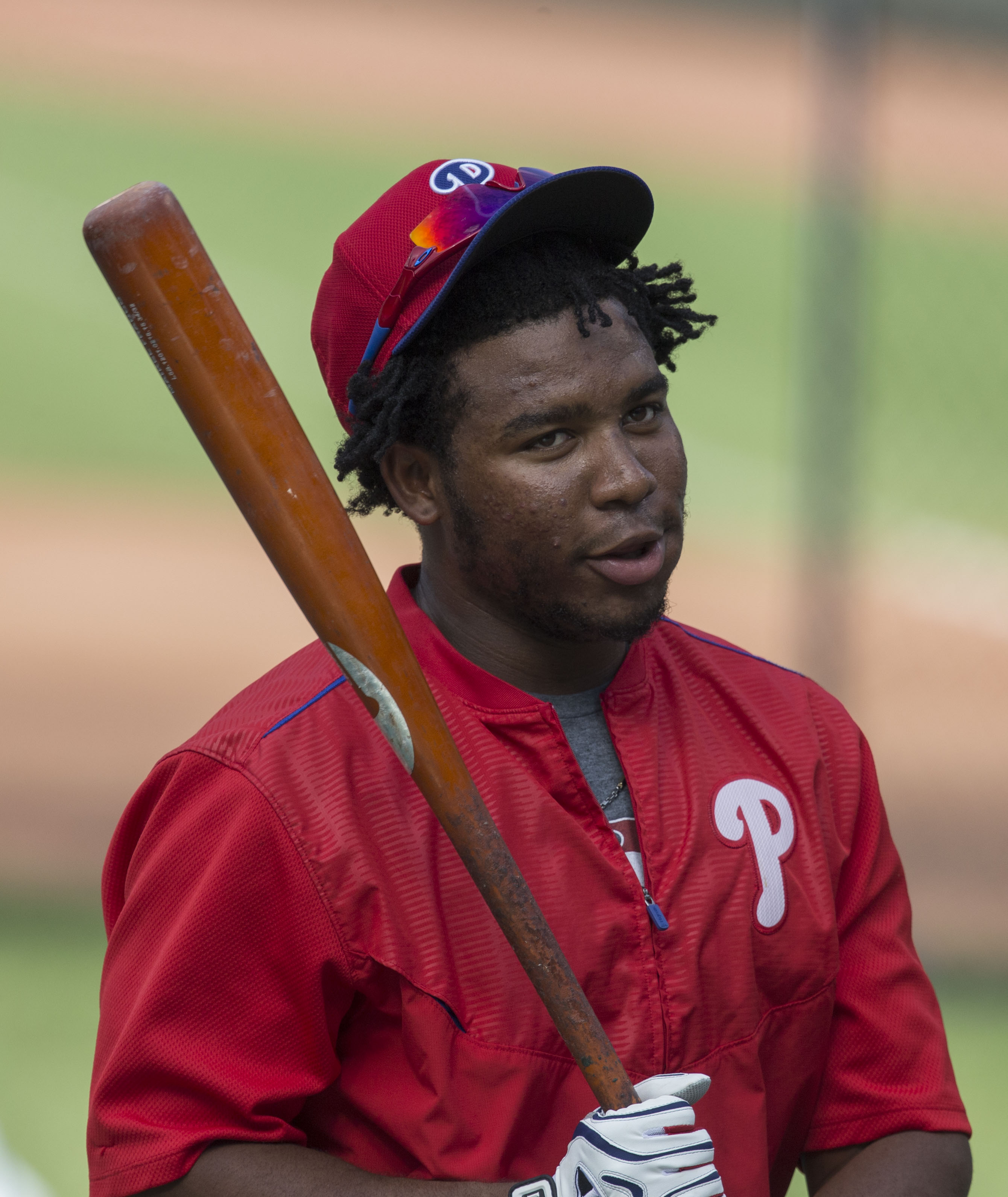 Phillies at Orioles 6/16/15